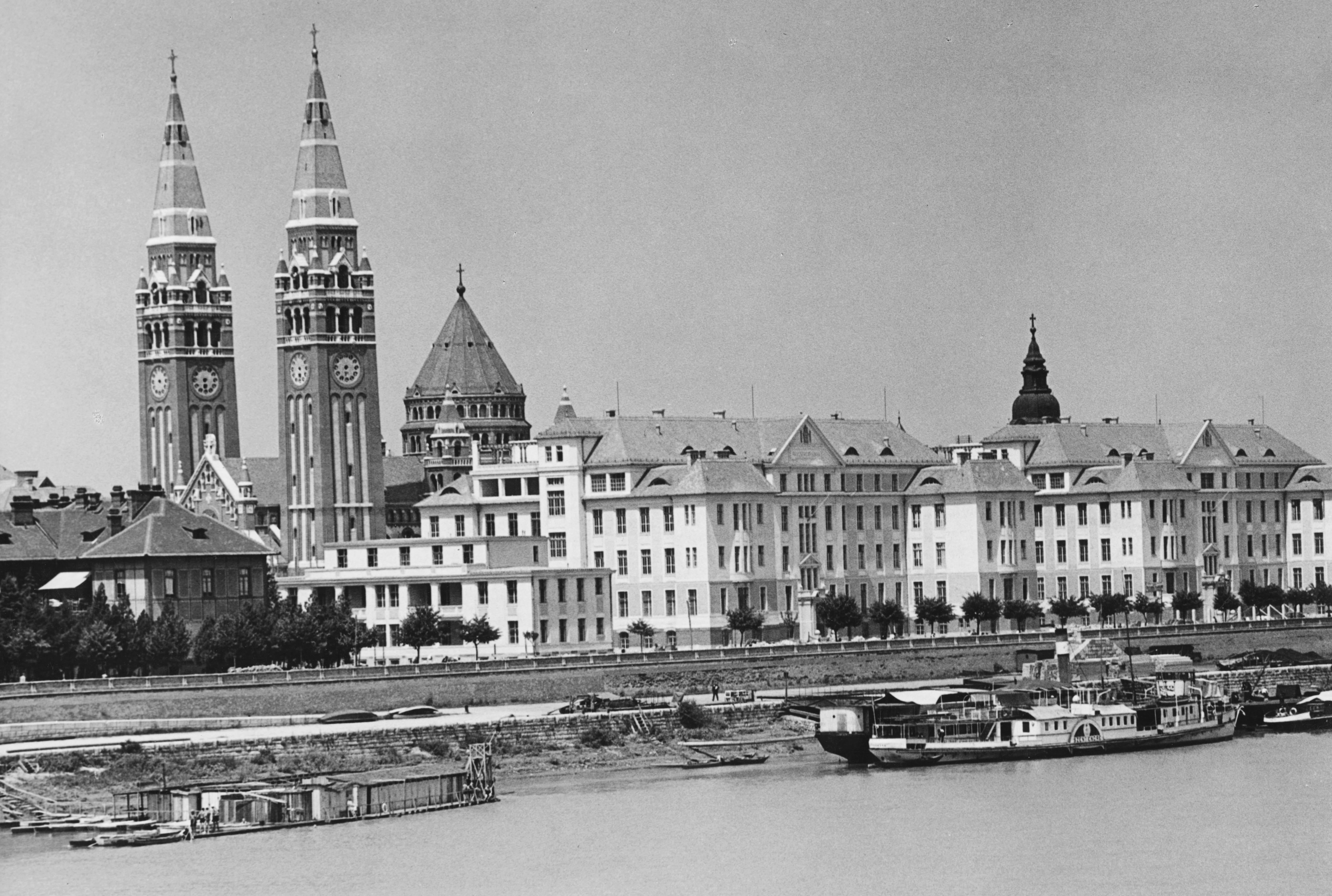 Tisza part a Szentendre gőzhajóval. Location: Hungary, Szeged Tags: ship, steamboat, church, Szentendre/MÁV IV./MÁV III./StEG IV. ship Title: Tisza part a Szentendre gőzhajóval.